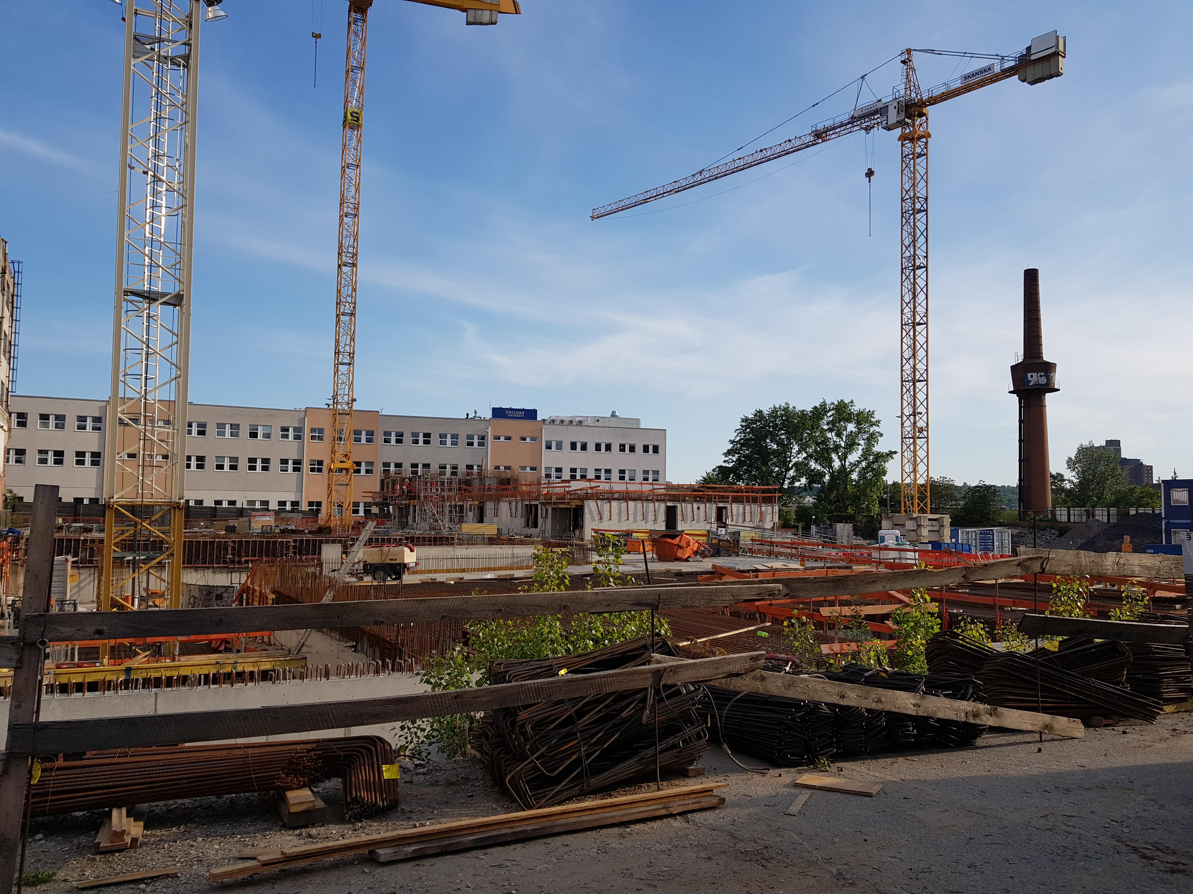 Čtvrť Emila Kolbena - 2. etapa, Praha 9-Vysočany, stav výstavby v květnu 2020. Na snímku vpravo je památkově chráněný komín s límcem v bývalém areálu závodu PRAGA z 20. let 20. století. Za staveništěm je budova KCD 4, Kolbenova 942/38a.